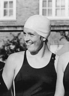 Iris Komar